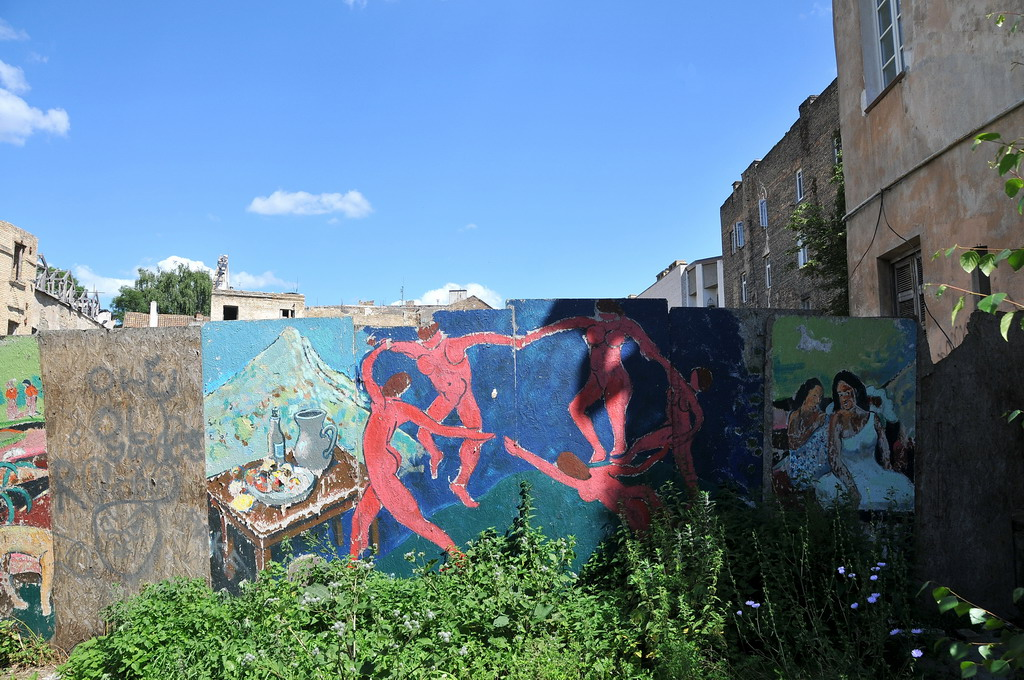 Heel opvallend in deze verder behoorlijk schone stad is de graffiti. De stad is er compleet mee overwoekerd. Op deze afbeelding is o.a. het bekende schilderij 'de dans' van Henri Matisse te zien.